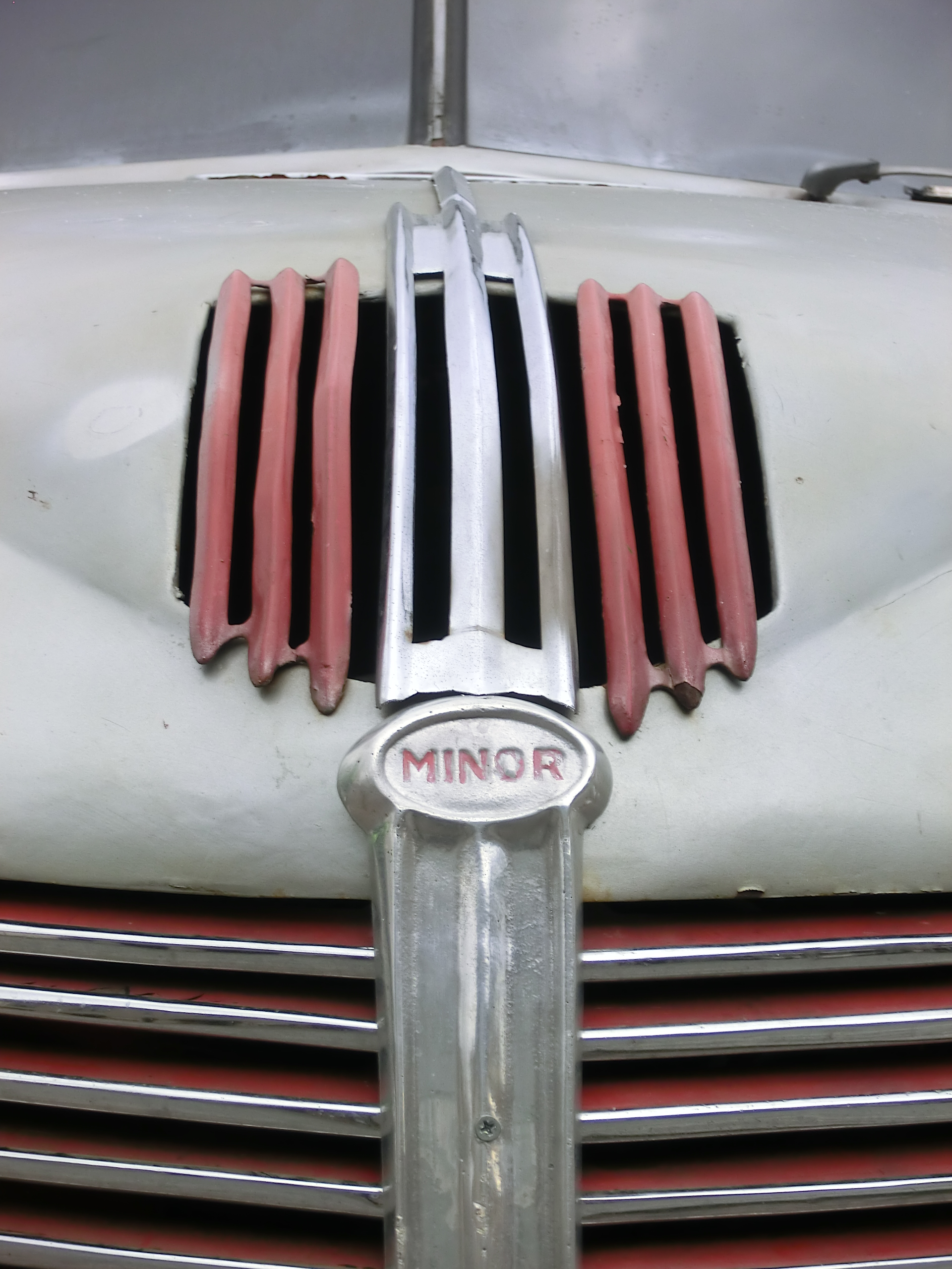 Vůz Aero na soutěži pro historická vozidla "Tatra v Českém ráji 2014", Jilemnice.